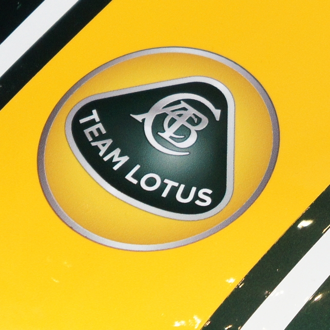 Imagen del logo del equipo Team Lotus, presente en el monoplaza T128 correspondiente a la temporada 2011 de Fórmula 1.